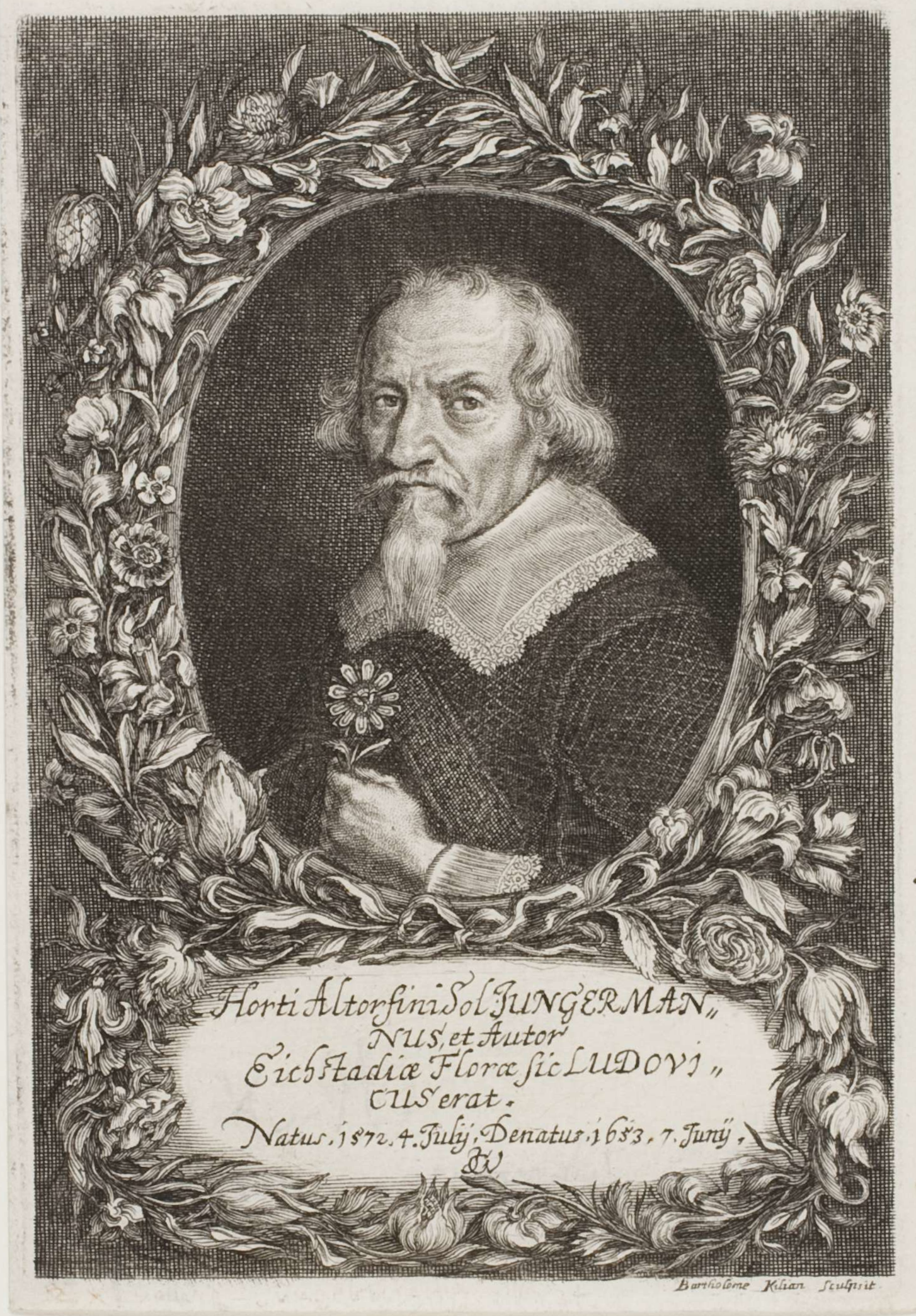 Ludwig Jungermann (1572-1653), deutscher Professor der Medizin und Botanik, nach einem Stich von nach einem Stich von B. Kilian Autotypie